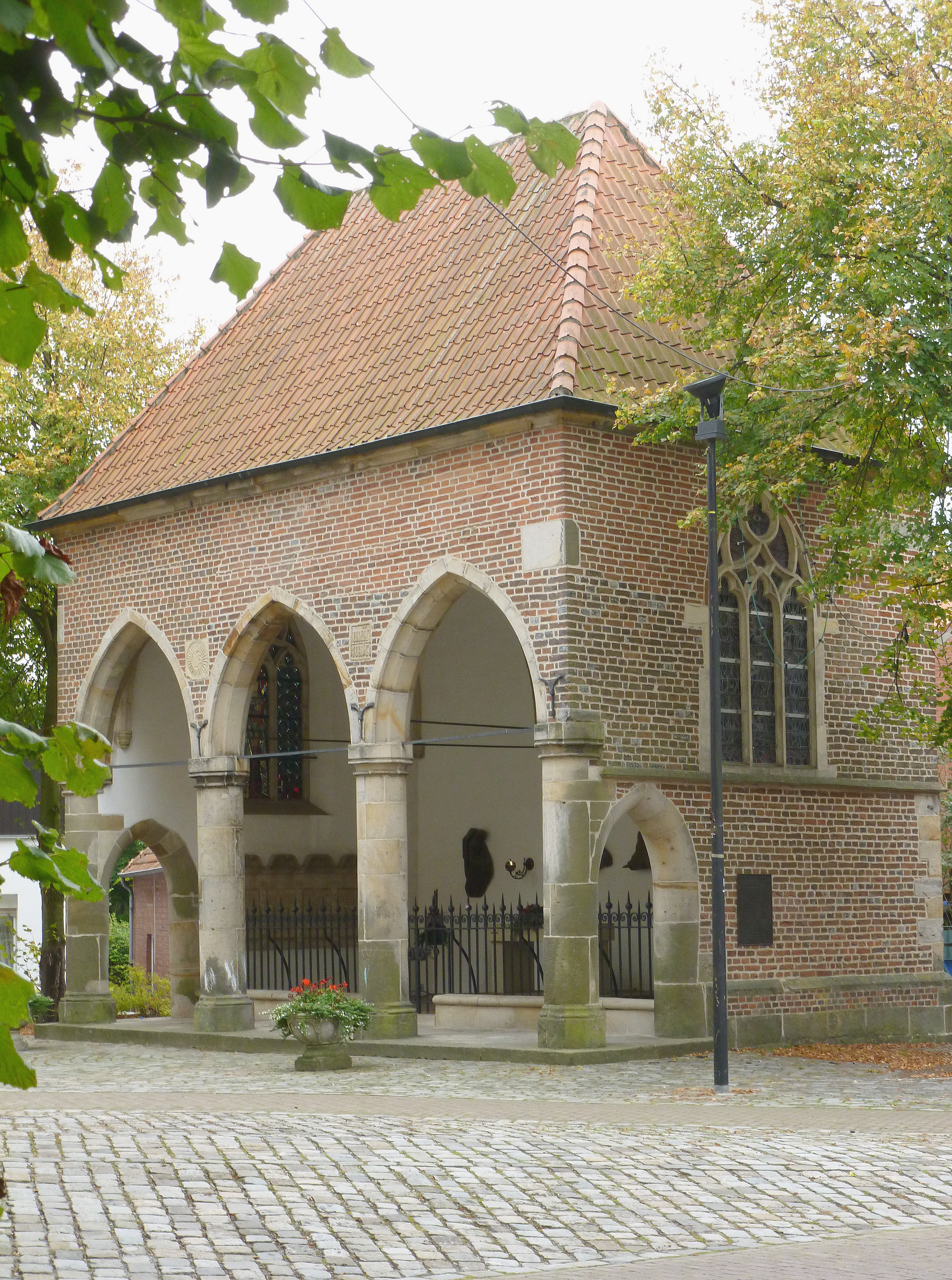 Ehemalige Gebetshalle, jetzt Kriegerehrenmal, in Wessum This is a photograph of an architectural monument.It is on the list of cultural monuments of Ahaus